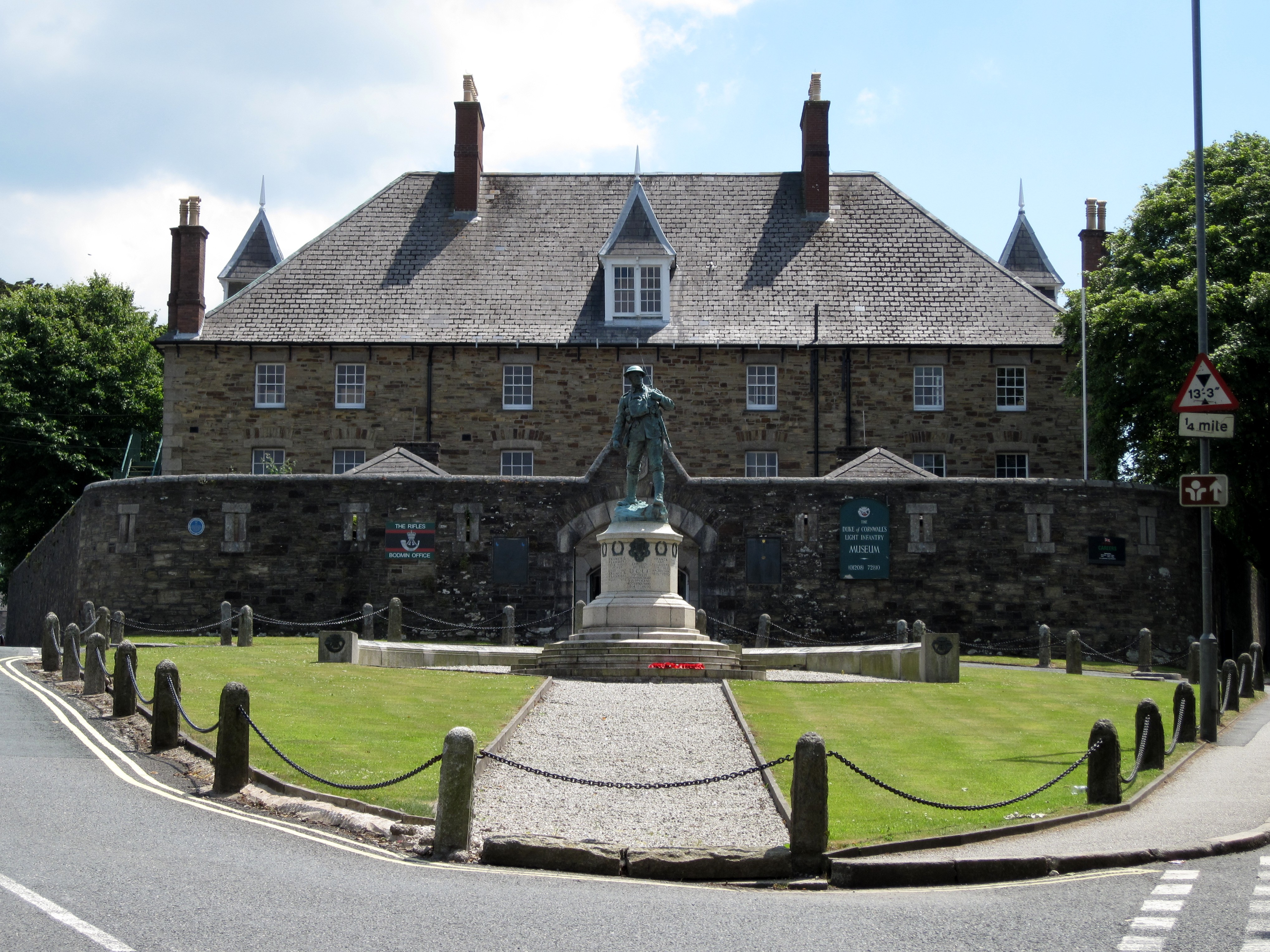 Militärmuseum in Bodmin (Light Infantry Military Museum), Cornwall, Großbritannien